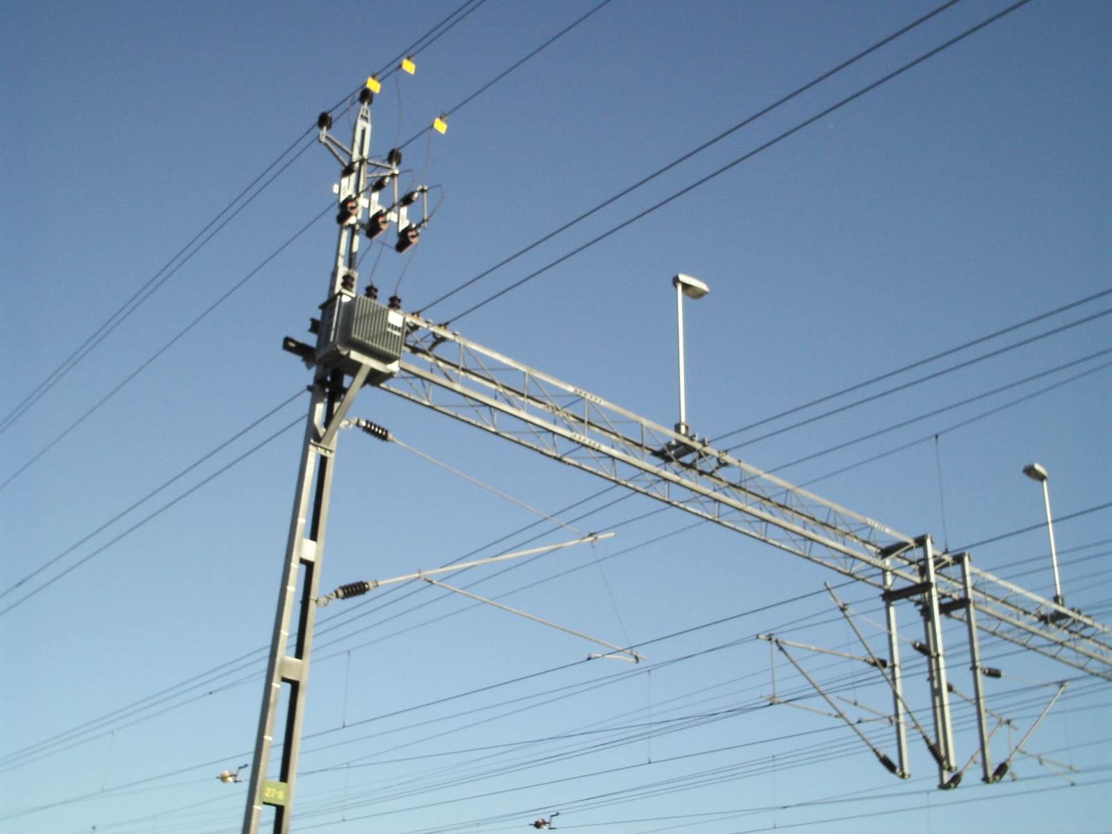 Hjälptransformator